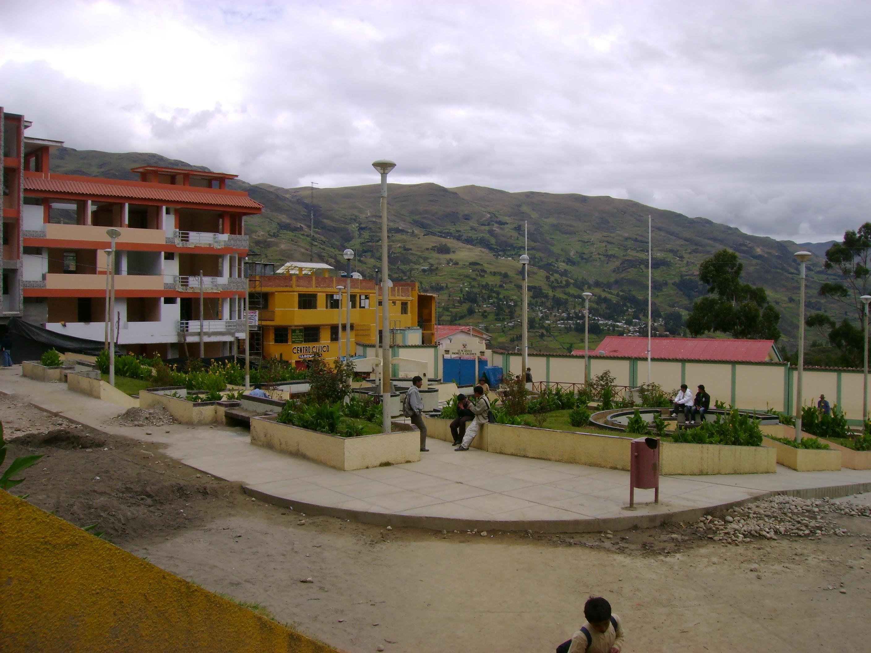 Plaza de Armas